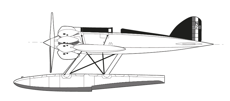 Profil Short Crusader 1927